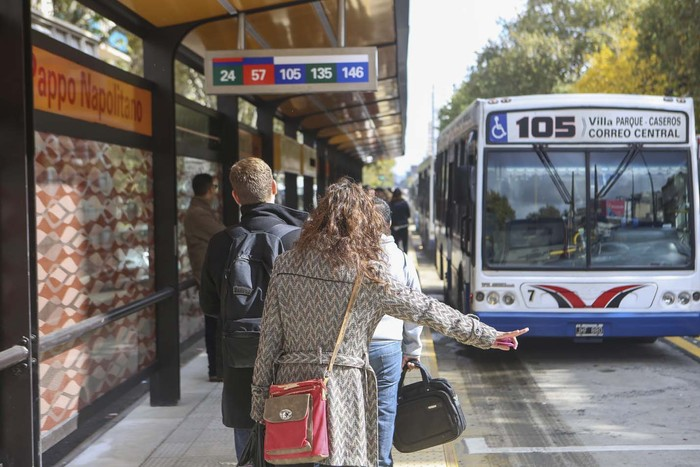 Metrobús San Martín, Ciudad de Buenos Aires